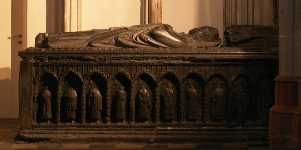 Zelfgemaakte opname Dom Utrecht 2006-11-24 (let op afgehakte hoofden heiligen op de kist van Guy d'Avesnes)